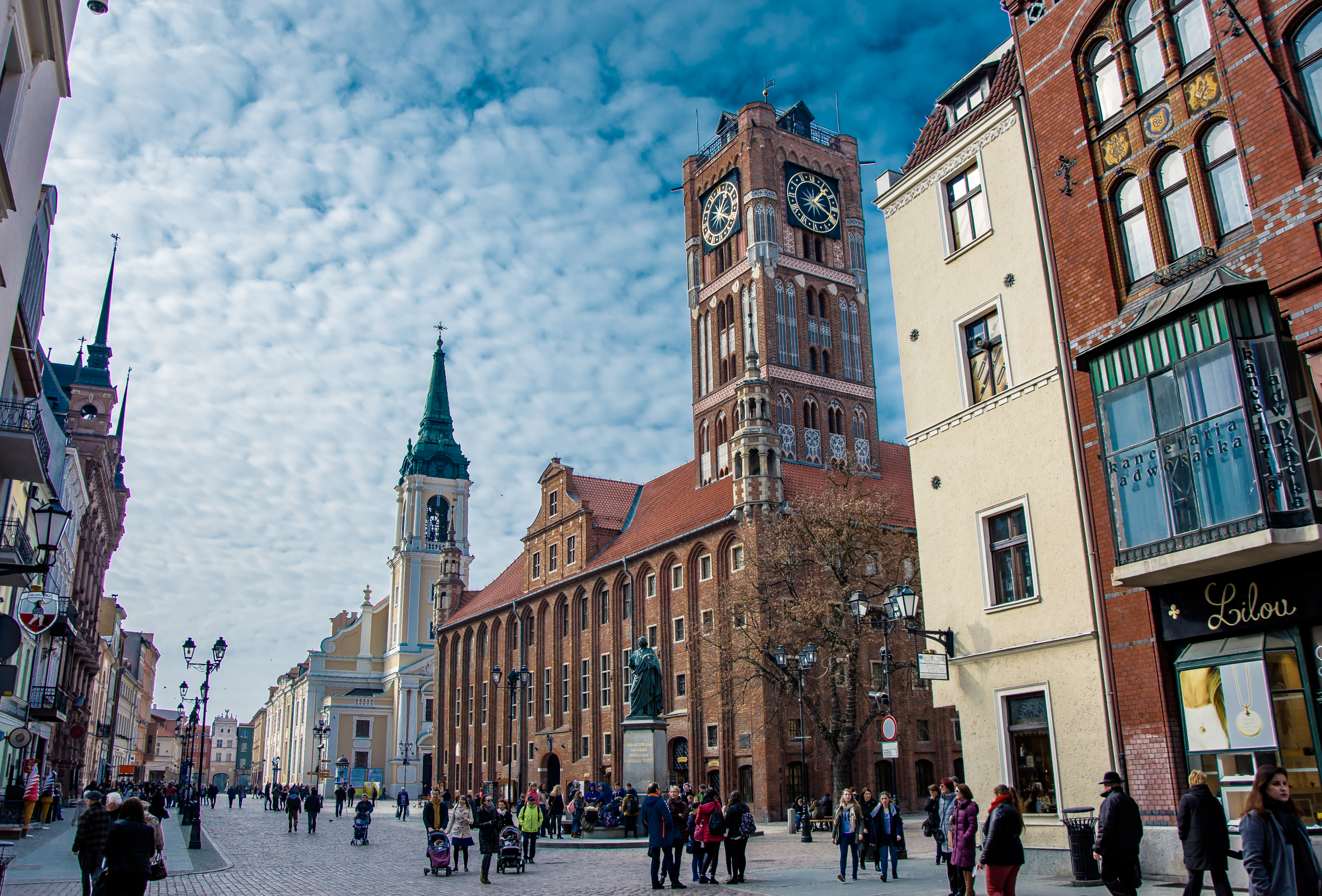 Stare Miasto, Ratusz Staromiejski w Toruniu Wikidata has entry Q6796021 with data related to this item.